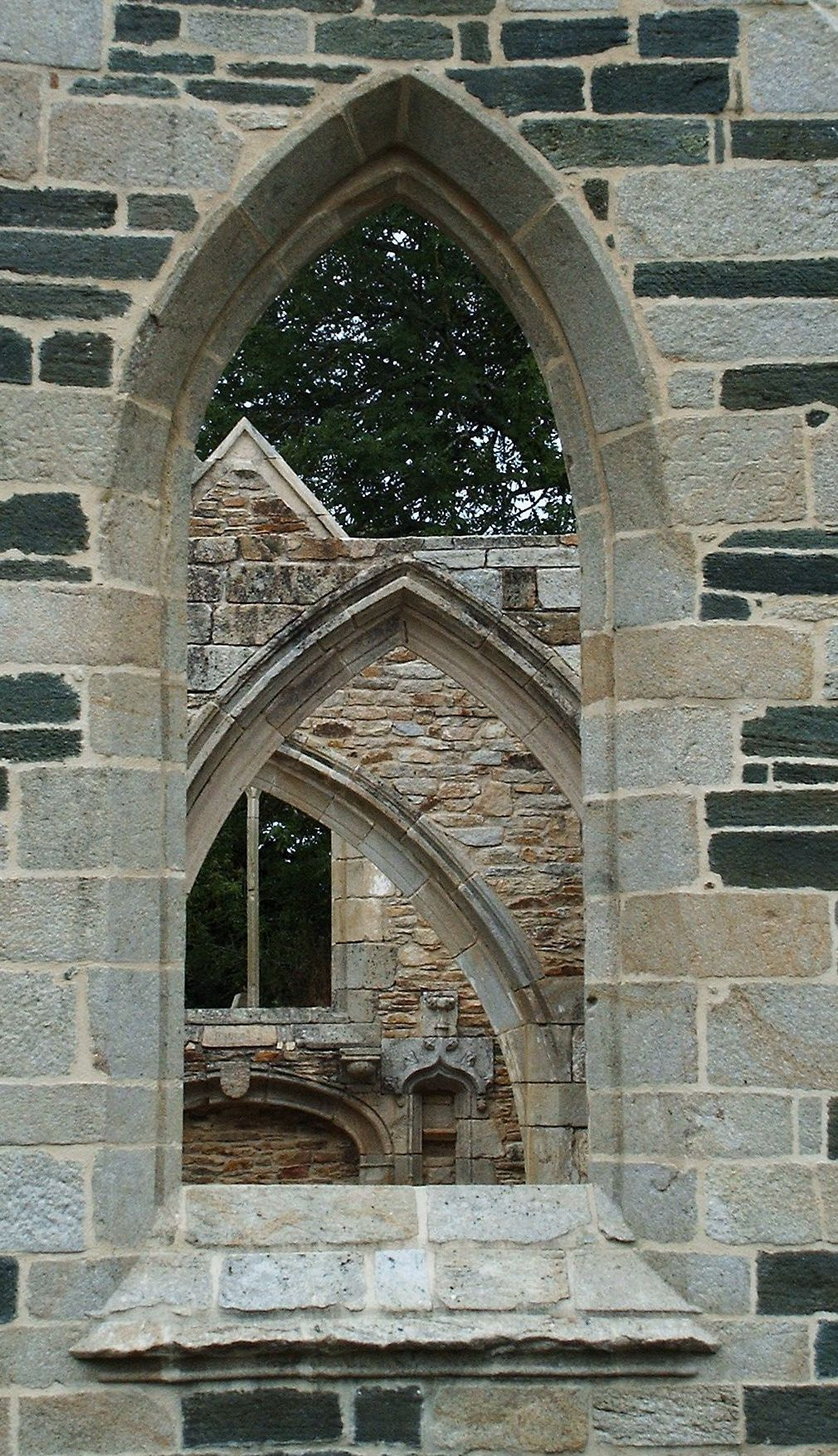 Ruine der Kirche St.Philibert in Lanvern